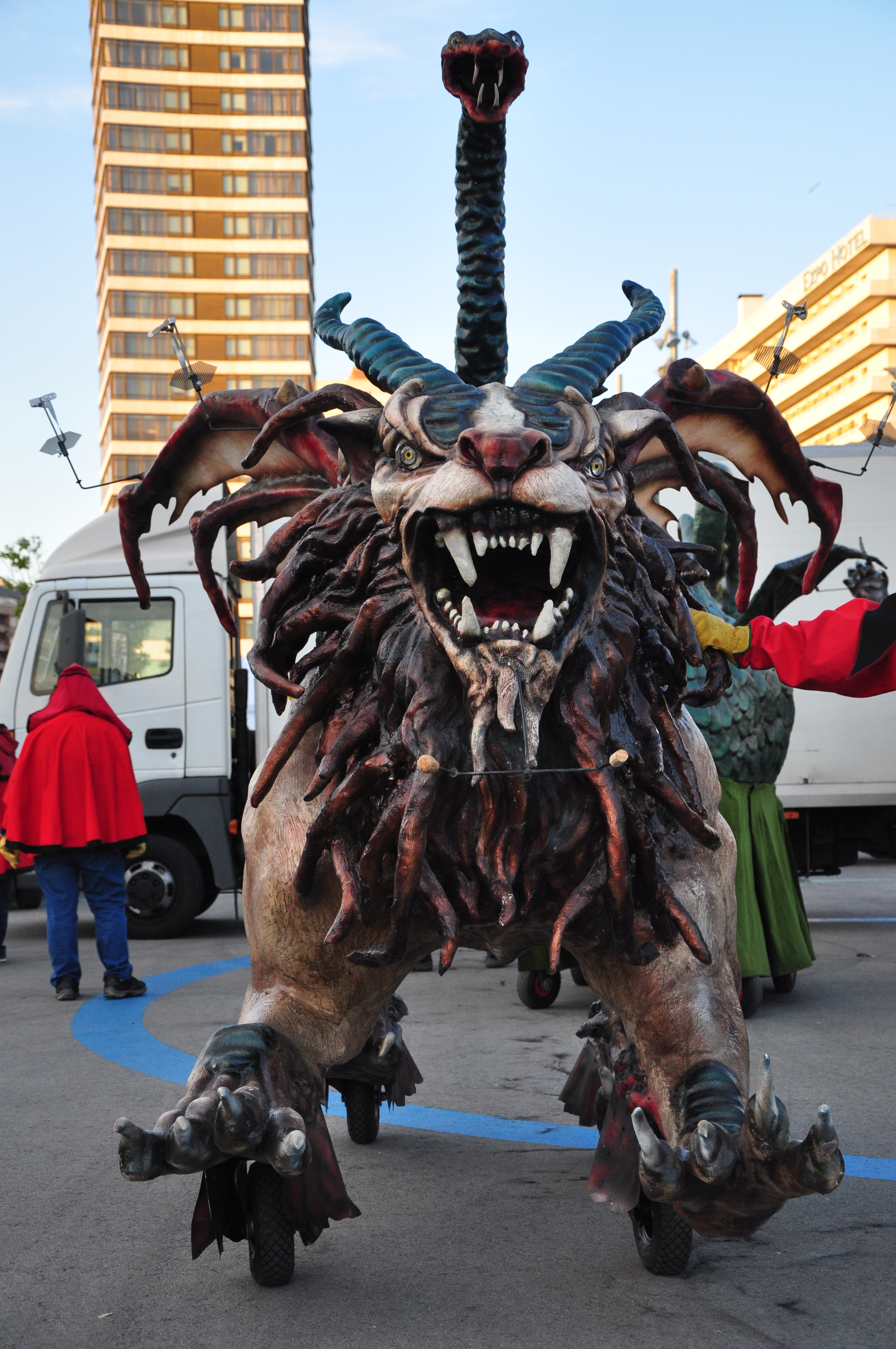 Drac quimera Loky del barri de Sants de Barcelona. La Quimera és un animal que té el cap de lleó, cos i cap de cabra i cua de serp. La Quimera és filla de Tifó i Equidna. Era un monstre molt temible atacava els ramats dels altres i a vegades altres persones. El més aterrador del monstre era que escopia foc per la boca. Iobates, rei de Lacia, va demanar a Belerofont que la matés amb l’ajuda del cavall alat Pegàs. El drac quimera Loky és un drac amb cos i cap de lleó agressiu, amb les 4 potes a terra i amb rodes. La cua del lleó es converteix en una serp i del llom de la bèstia neixen dues ales. El cap del lleó porta dues banyes, en referència a la cabra del mite de la Quimera. El lleó va arrossegat amb una cadena per dos diables. Disposa de 11 punts de foc a la boca, cua i ales. Té una llargada de 3,20 mts i una alçada de 3,10 mts a la boca de la serp. SEls ulls del lleó i de la serp estan il·luminats per leds vermells. El nom de Loky prové d’un personatge de la mitologia nòrdica.